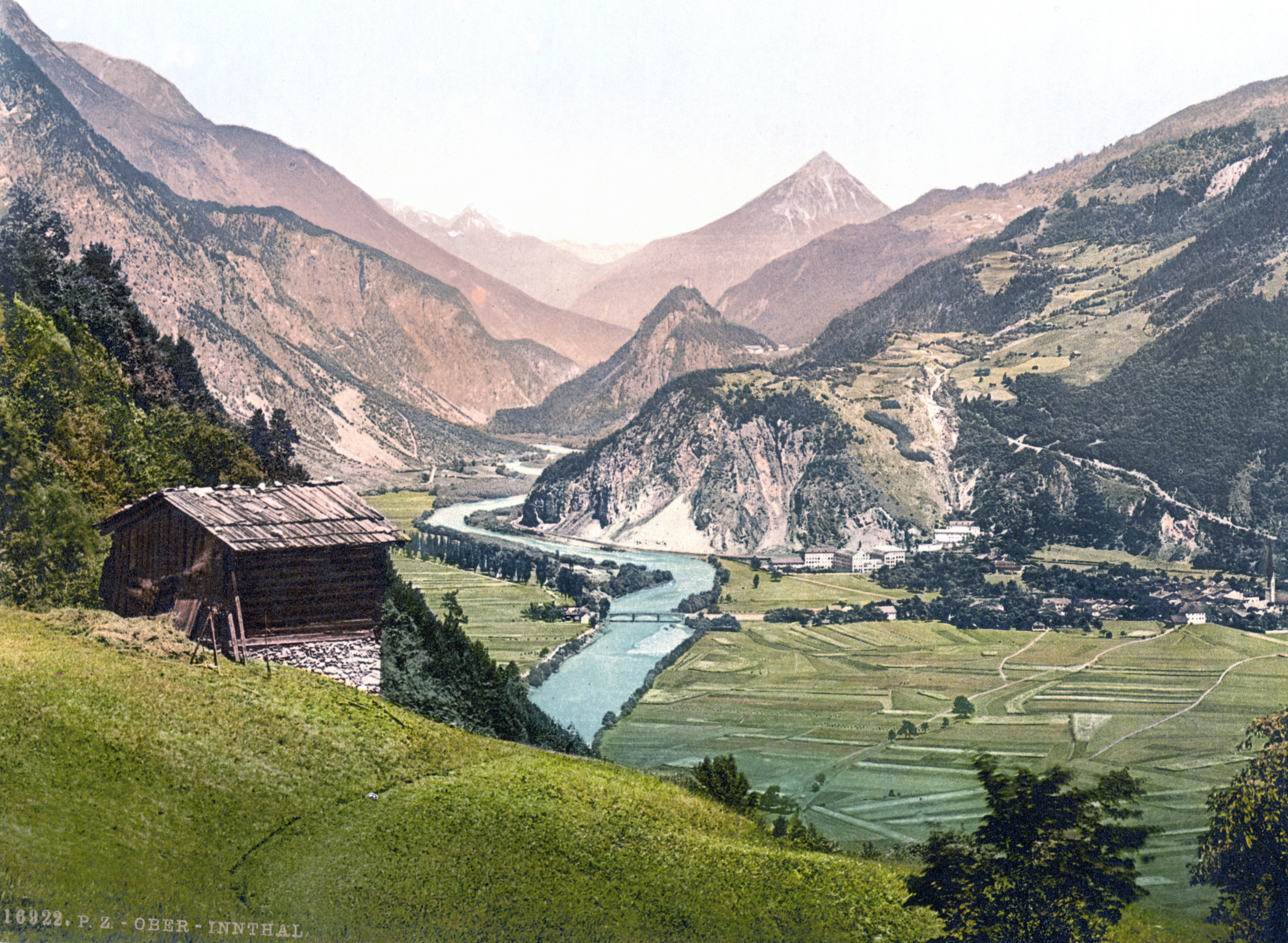 Oberinntal von Schrofenstein um 1900